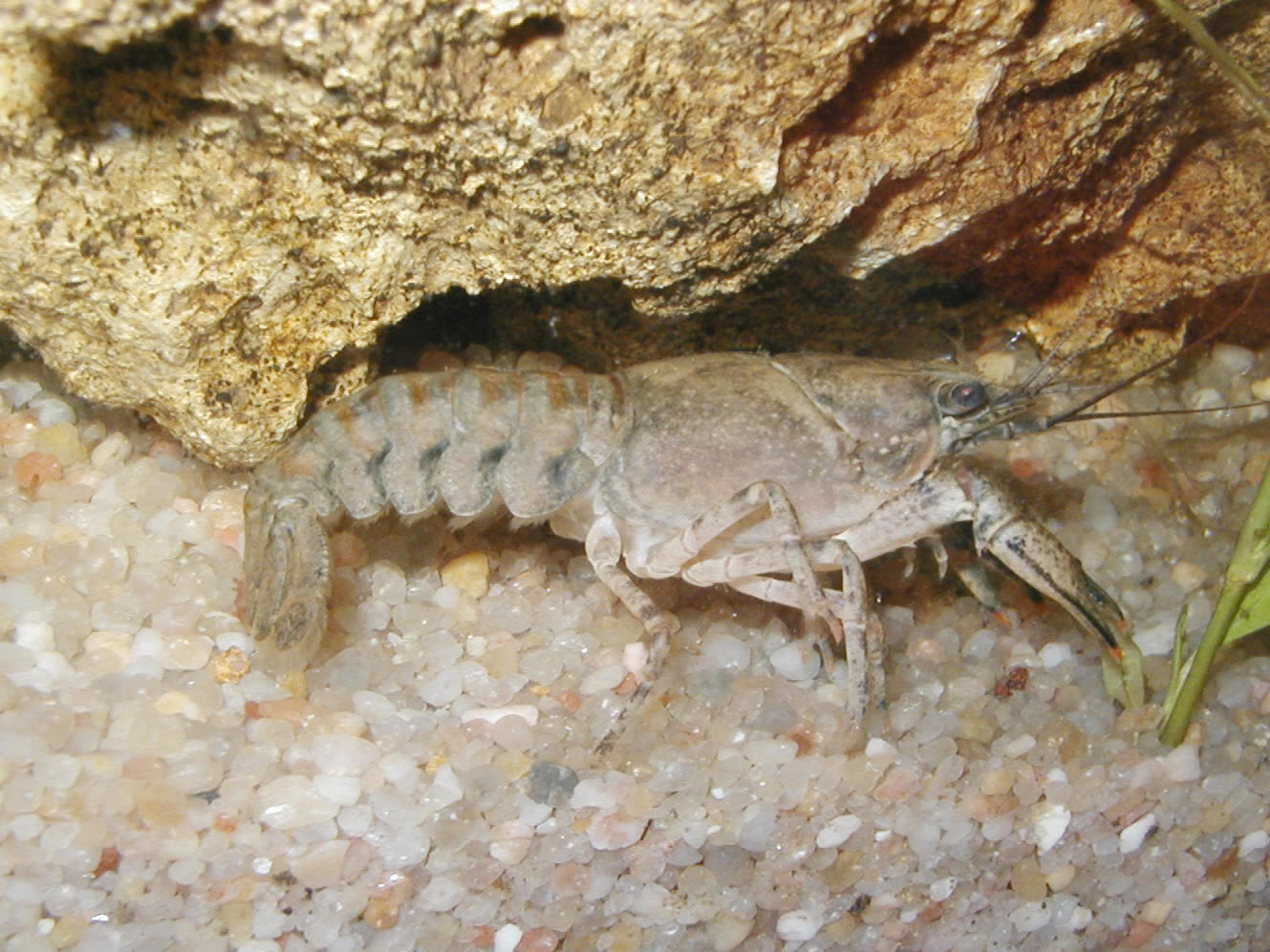 Amerikanischer Flußkrebs (Orconectes limosus).